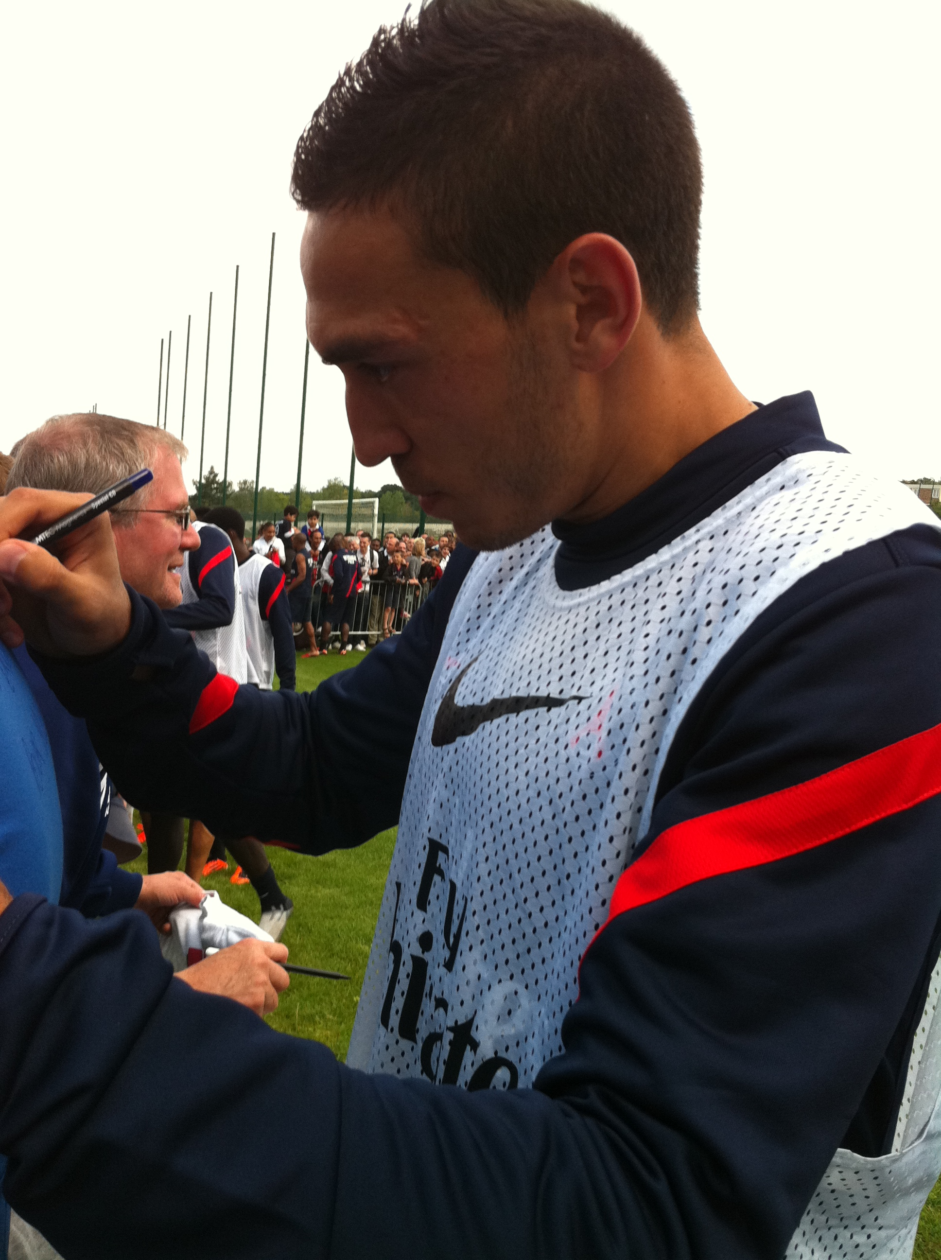 Mevlüt Erding au Camp des Loges en 2011